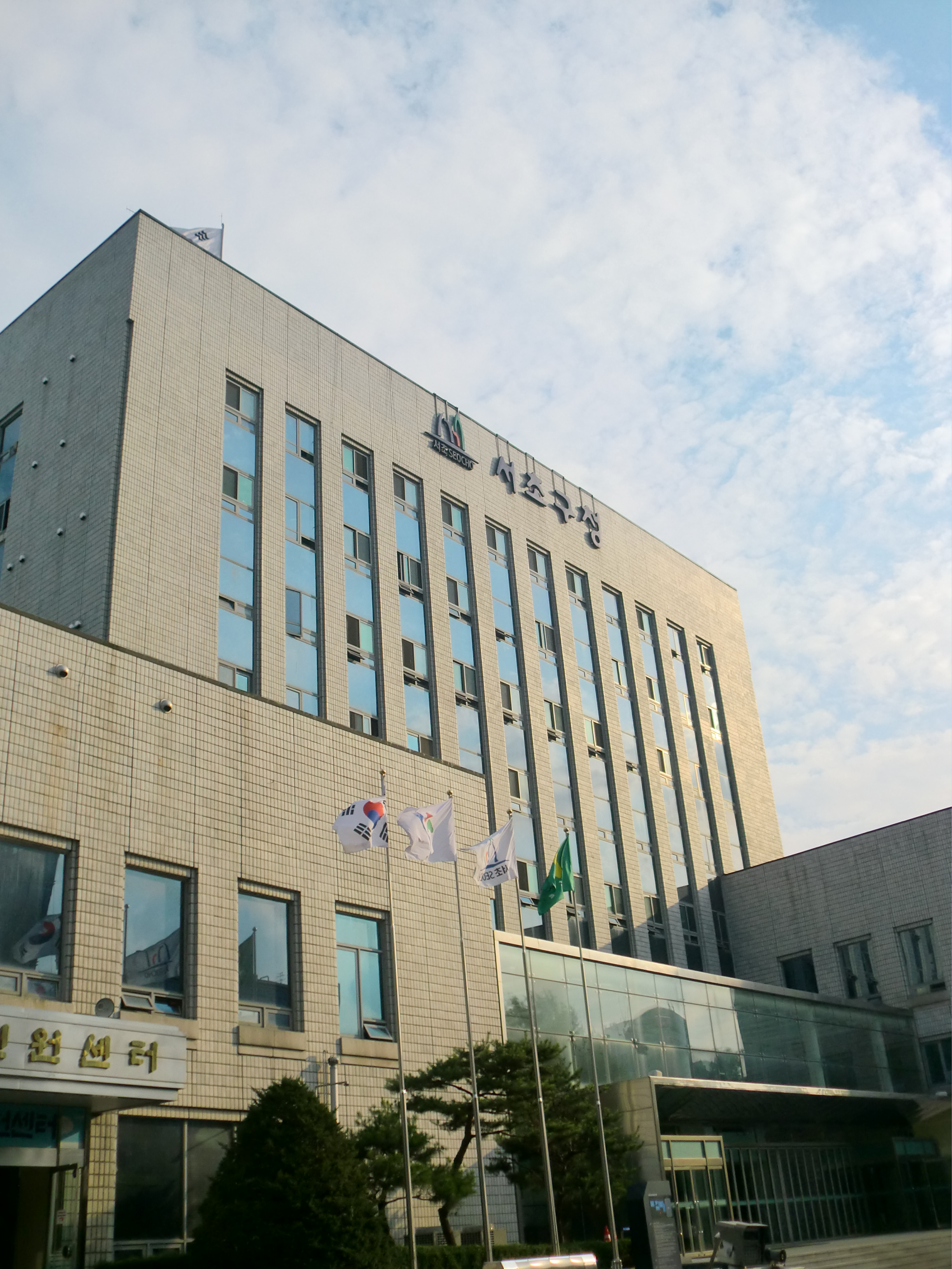 서울특별시 서초구에 있는 서초구청